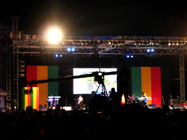 Rebel Salute. Port Kaiser, St. Elizabeth. Foto: Dubdem e FabDub.